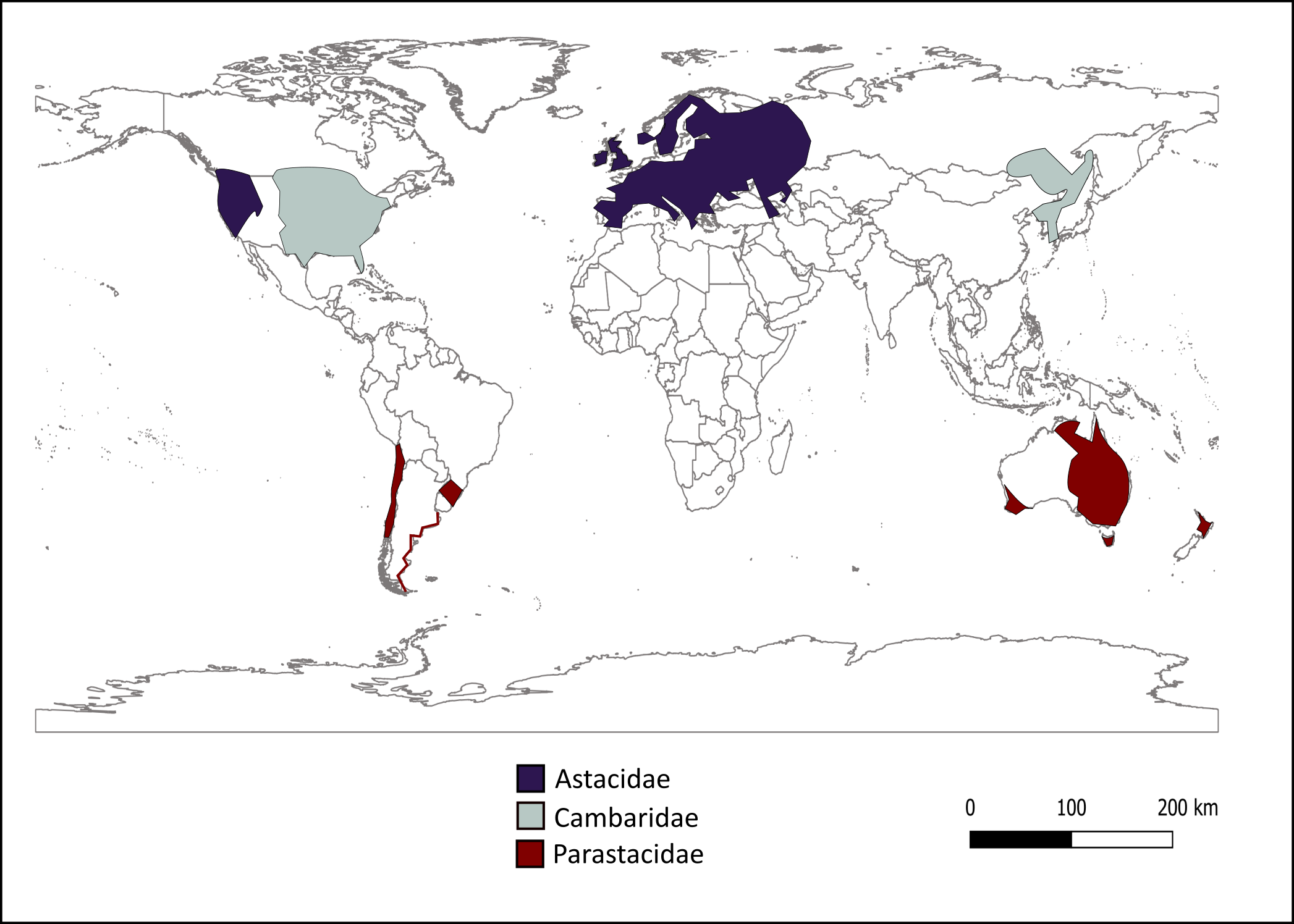 Imagem alterada do livro A Global Overview of the Conservation of Freshwater Decapod Crustaceans, de Kawai & Cumberlidge, 2016.